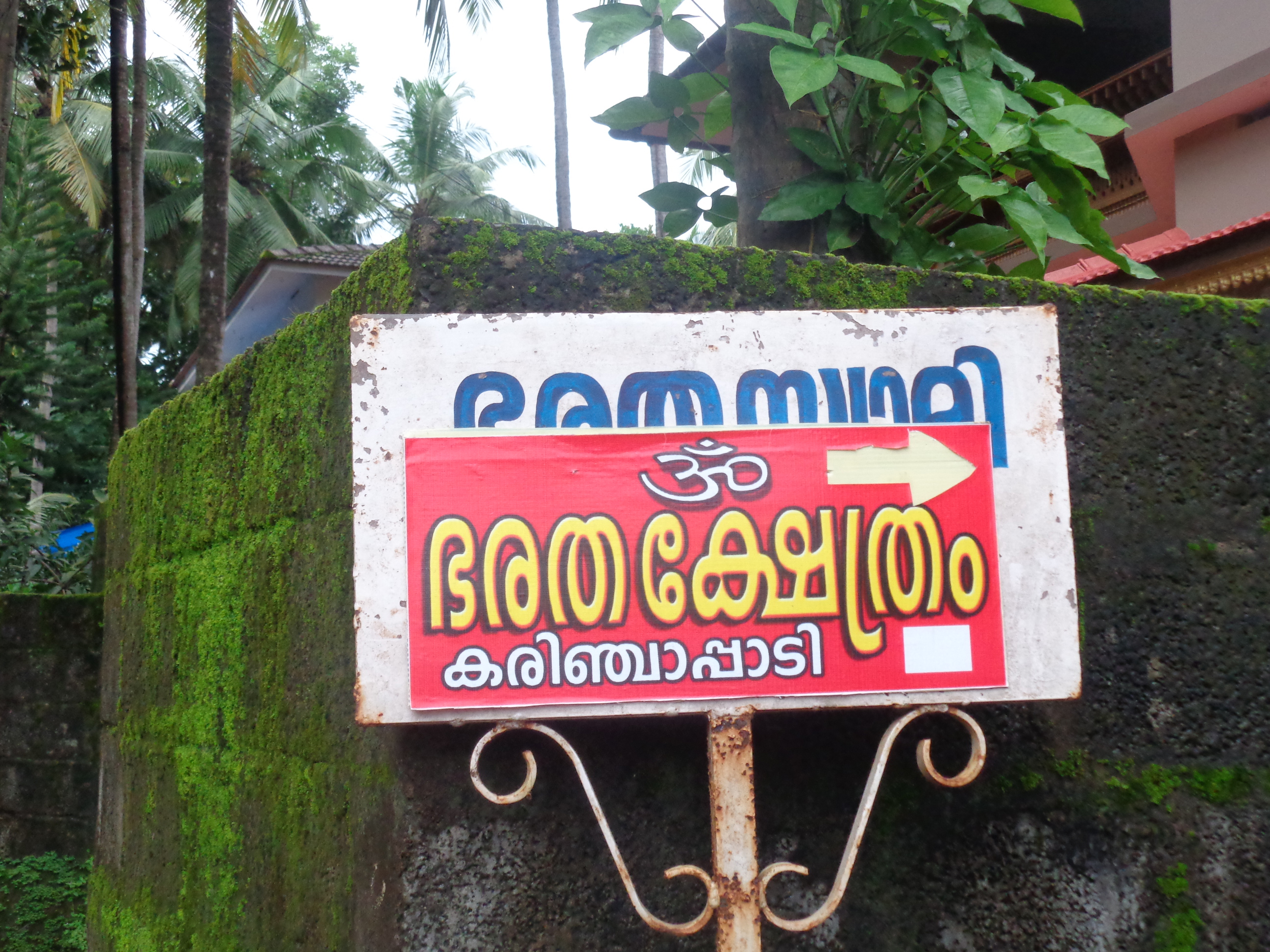 board at bharata temple karichapadi